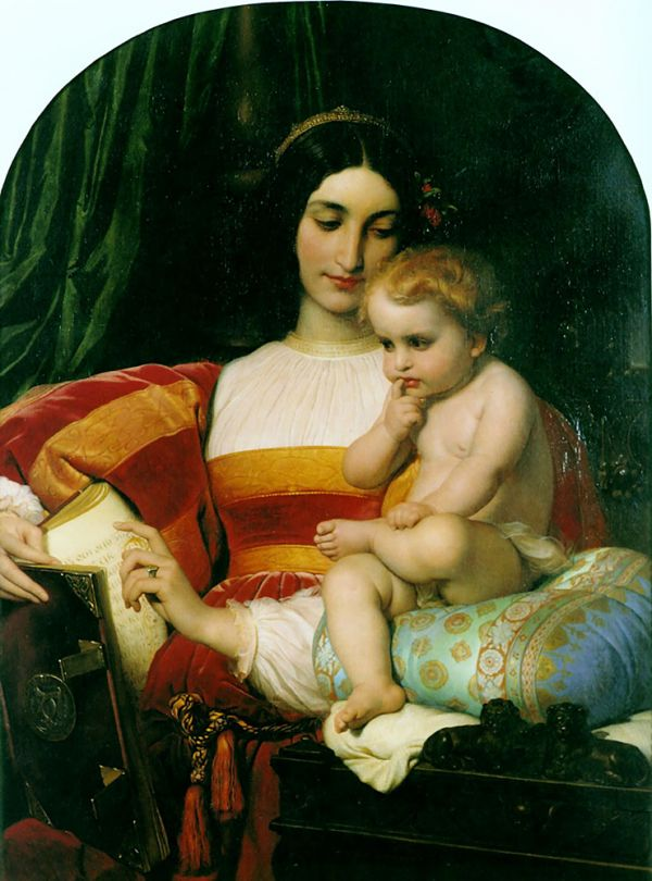 The Childhood of Pico della Mirandolalabel QS:Len,"The Childhood of Pico della Mirandola" label QS:Lfr,"L'enfance de Pic de la Mirandole" label QS:Lit,"L'infanzia di Pico della Mirandola"